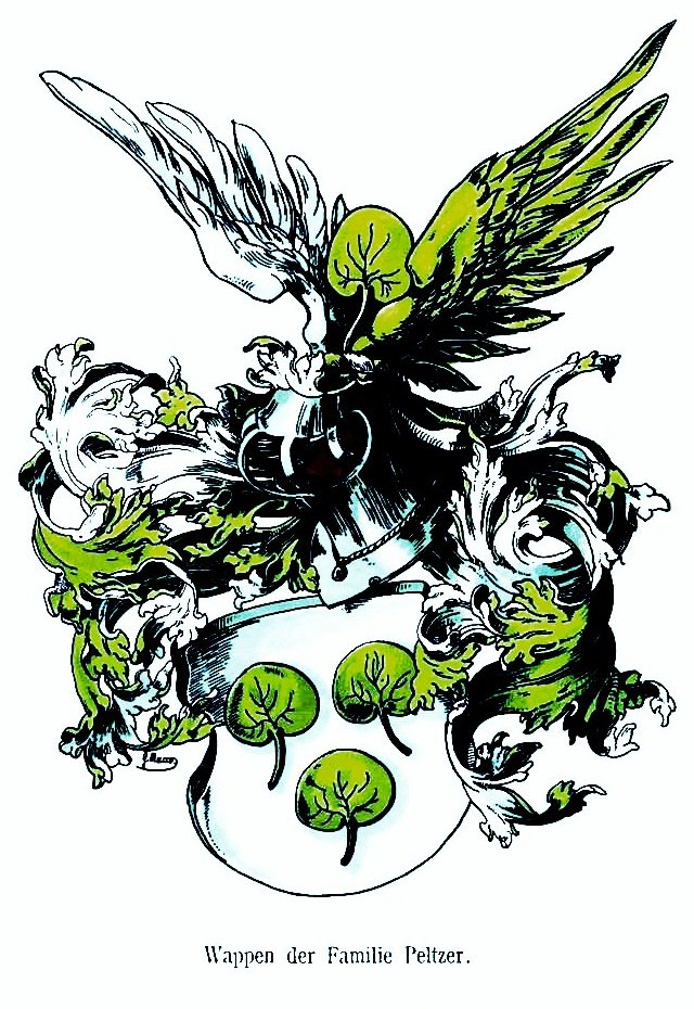 Ursprungswappen Wappen der Familie Peltzer